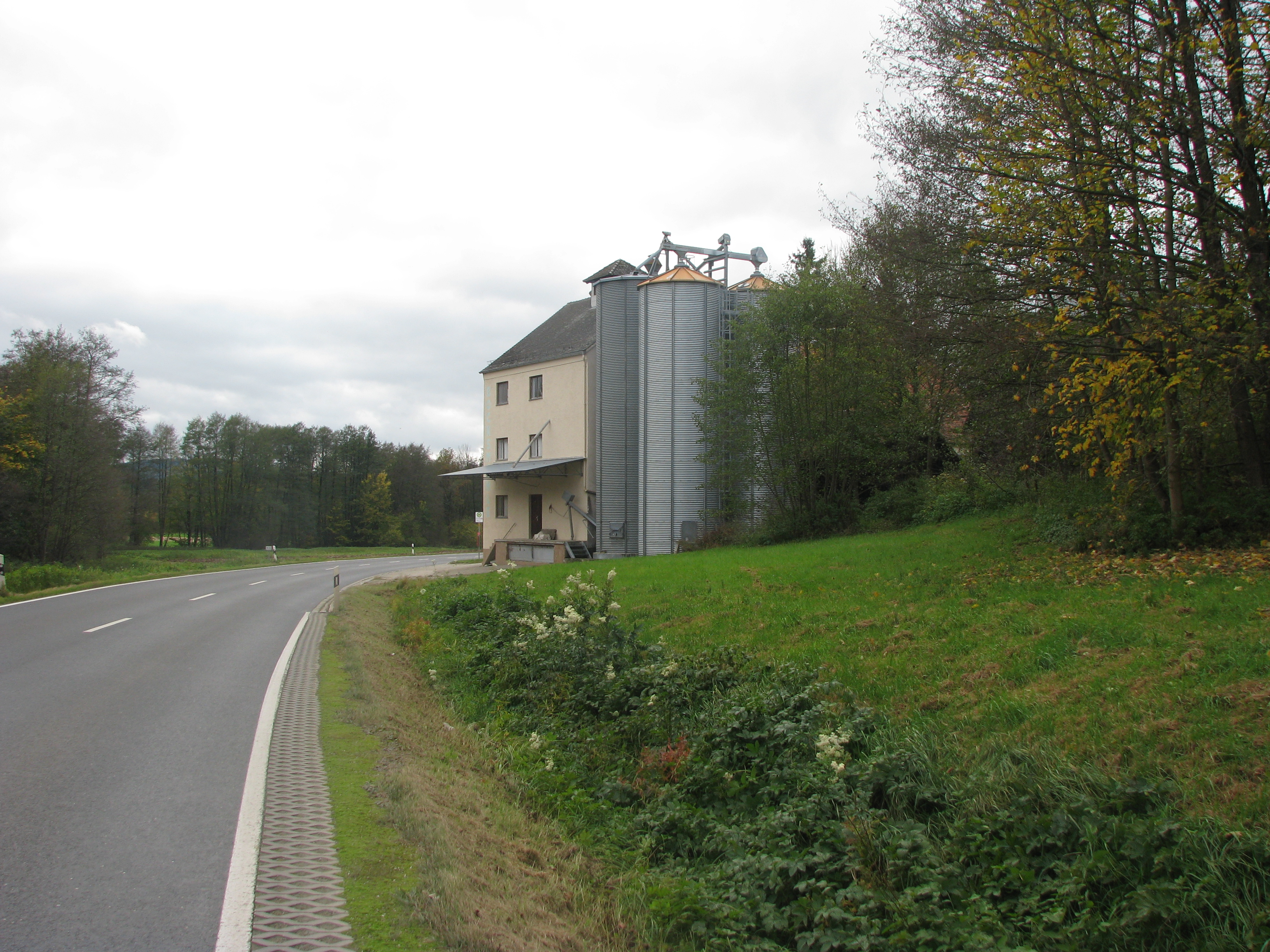 Irleshof, Ortsteil der Gemeinde Berg bei Neumarkt in der Oberpfalz, Bocksmühle